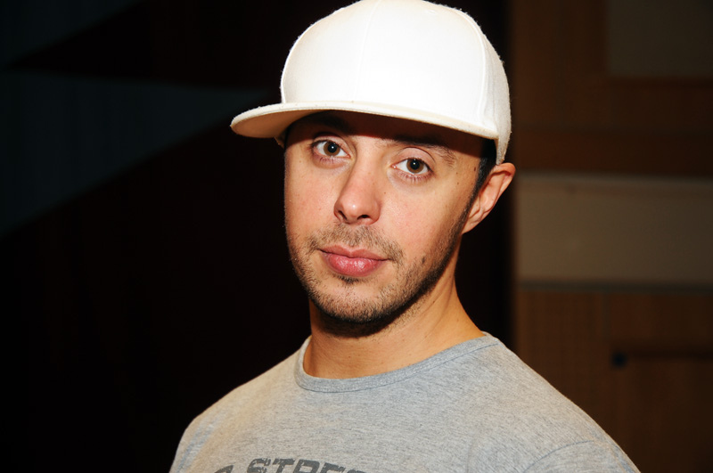 Martin Bentancourt (2013-12-16 Möte om drömmar) Folkets Hus, Rinkeby